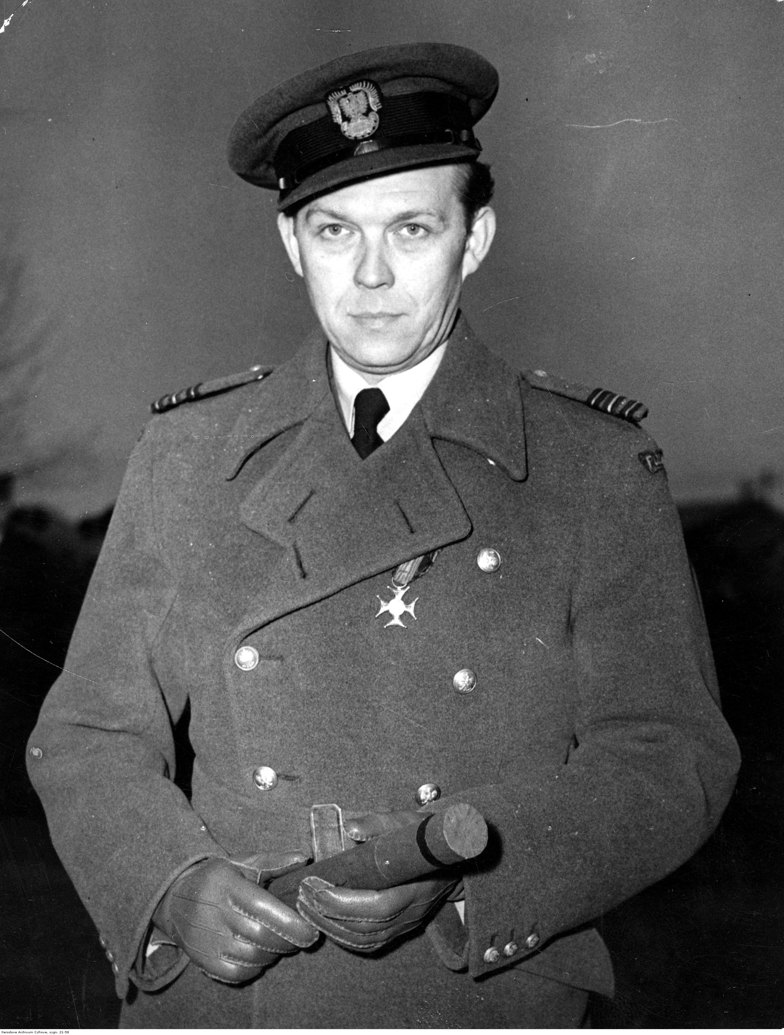 Aleksander Gabszewicz, major pilot Polskich Sił Powietrznych w Wielkiej Brytanii - fotografia pozowana.